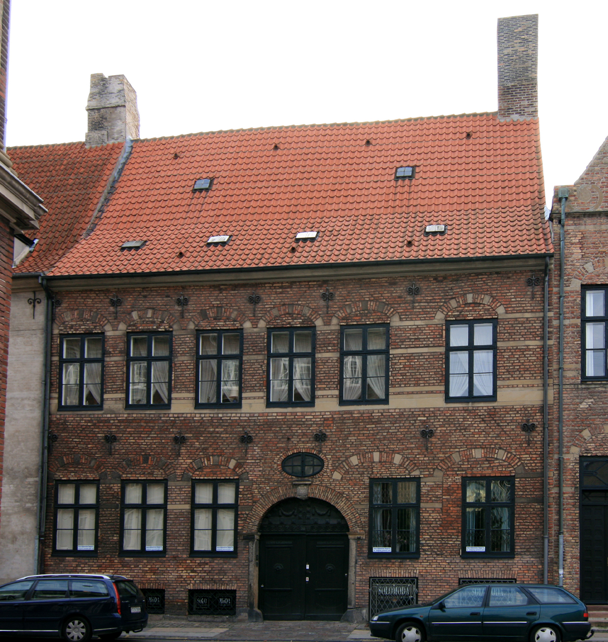 Sigvert Grubbes Gård, Strandgade 30, København. Bygget ca. 1630. Fredet.